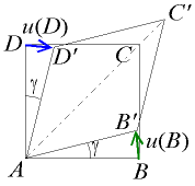 Cisaillement pur γ et champ de déplacement u. Shear strain γ and displacement field u. Auteur : Christophe Dang Ngoc Chan (Cdang)